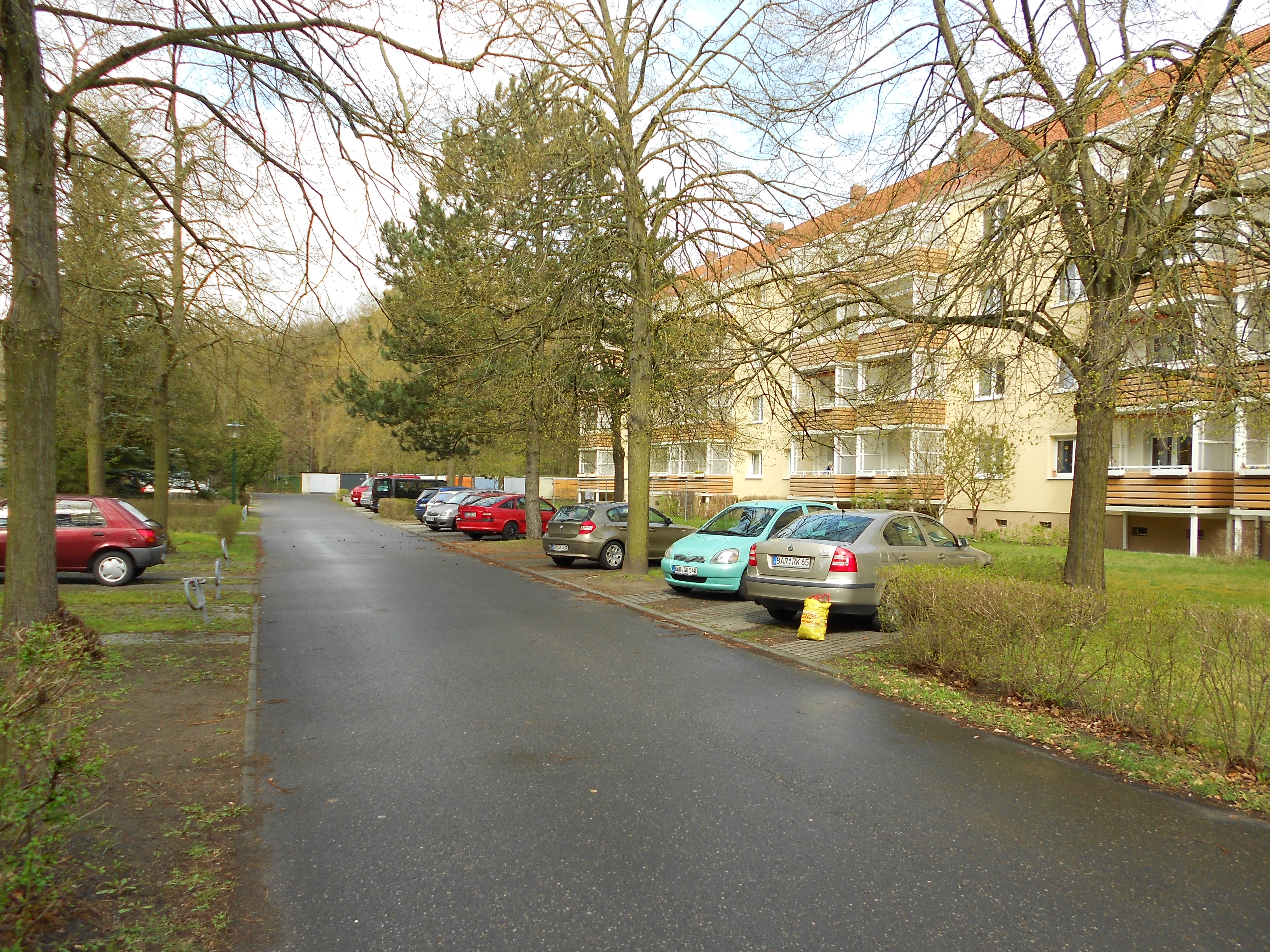 Eberswalde Westend Wildparkstraße